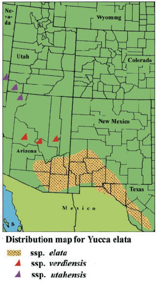 Verbreitungsgebiet von Yucca elata und Subspezies B.jpg“